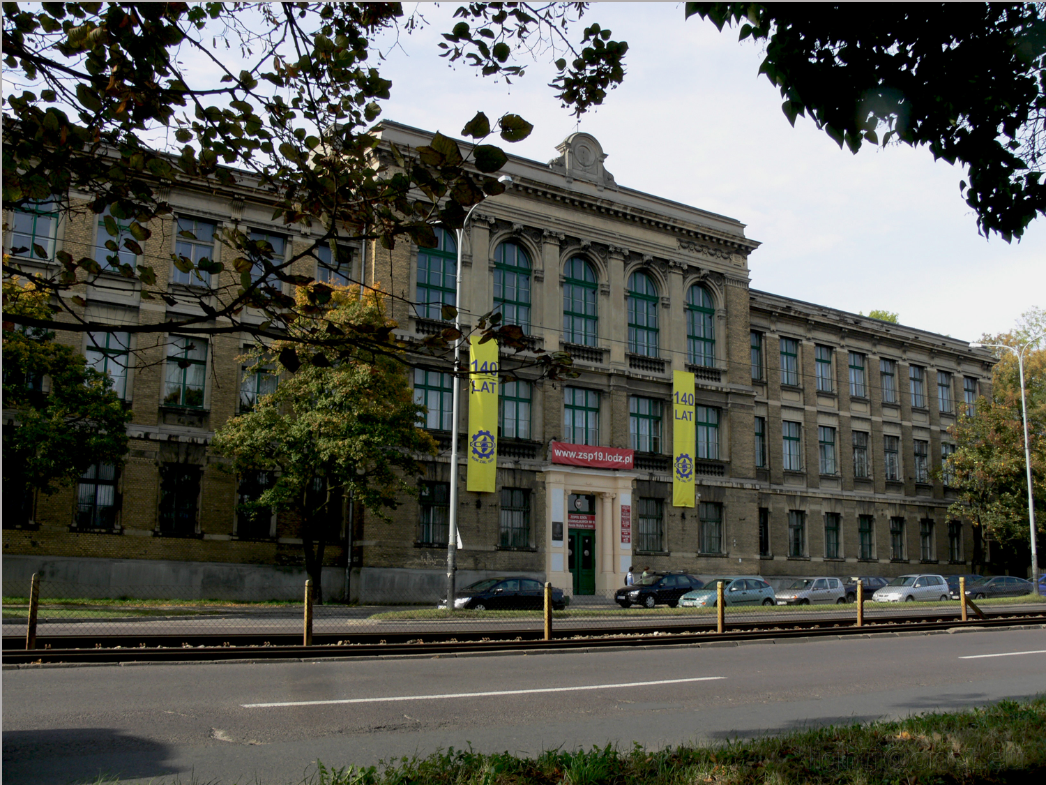 Najstarsza łódzka szkoła z wielkimi tradycjami, gości na stałe w historii Łodzi i regionu od 1869 roku. Rozpoczęła swoje istnienie na Placu Wolności (dawniej Nowym Rynku), by w 1903 r. zadomowić się w specjalnie dla niej wzniesionym budynku przy ul. Żeromskiego 115 (dawnej Pańskiej). Wielokrotnie zmieniała nazwy. W roku 1869 r. była to Łódzka Wyższa Szkoła Rzemieślnicza, a w 1899 r.- Łódzka Szkoła Rękodzielniczo-Przemysłowa. Kolejne zmiany nazwy miały miejsce w latach: 1919 r. - Państwowa Szkoła Włókiennicza 1933 r. - Państwowa Szkoła Techniczno-Przemysłowa 1951 r. - Technikum Przemysłu Włókienniczego Ministerstwa Przemysłu Lekkiego 1957 r. - Technikum Włókiennicze Nr 1 w Łodzi 1963 r .- Technikum Włókiennicze Nr 1 im. W. Tiereszkowej 1964 r .- Zespół Szkół Zawodowych Nr 3 1976 r. - Zespół Szkół Włókienniczych Nr 1 w Łodzi 1993 r. - Zespół Szkół Techniczno-Przemysłowych w Łodzi 2002 r .- Zespół Szkół Ponadgimnazjalnych nr 19 w Łodzi 2004 r. - Zespół Szkół Ponadgimnazjalnych nr 19 im. Karola Wojtyły w Łodzi Bez względu na nazwy i sytuację polityczną, szkoła realizowała jeden wspólny cel: rzetelne przegotowanie młodych ludzi do pracy.